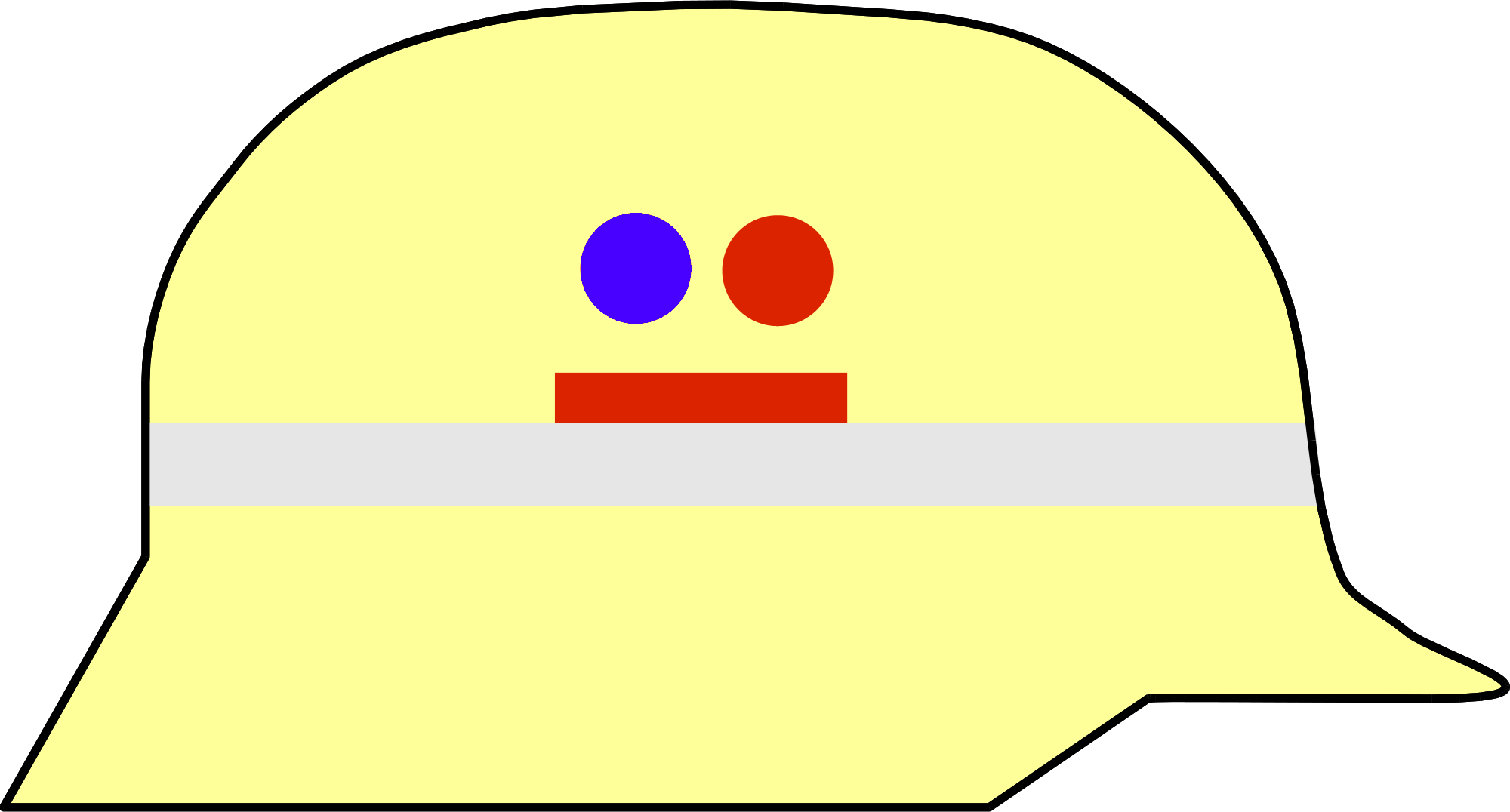 Feuerwehr-Helmkennzeichnungen Gruppenführer, Sanitäter und Atemschutzgeräteträger in Kombination (z.B. Hessen)